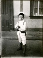 Jorge Basadre. Niñez en Tacna.